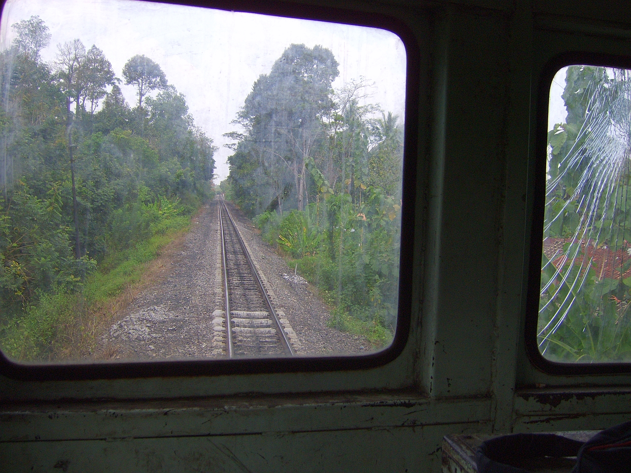 Ptkabb202 (202 01 D)